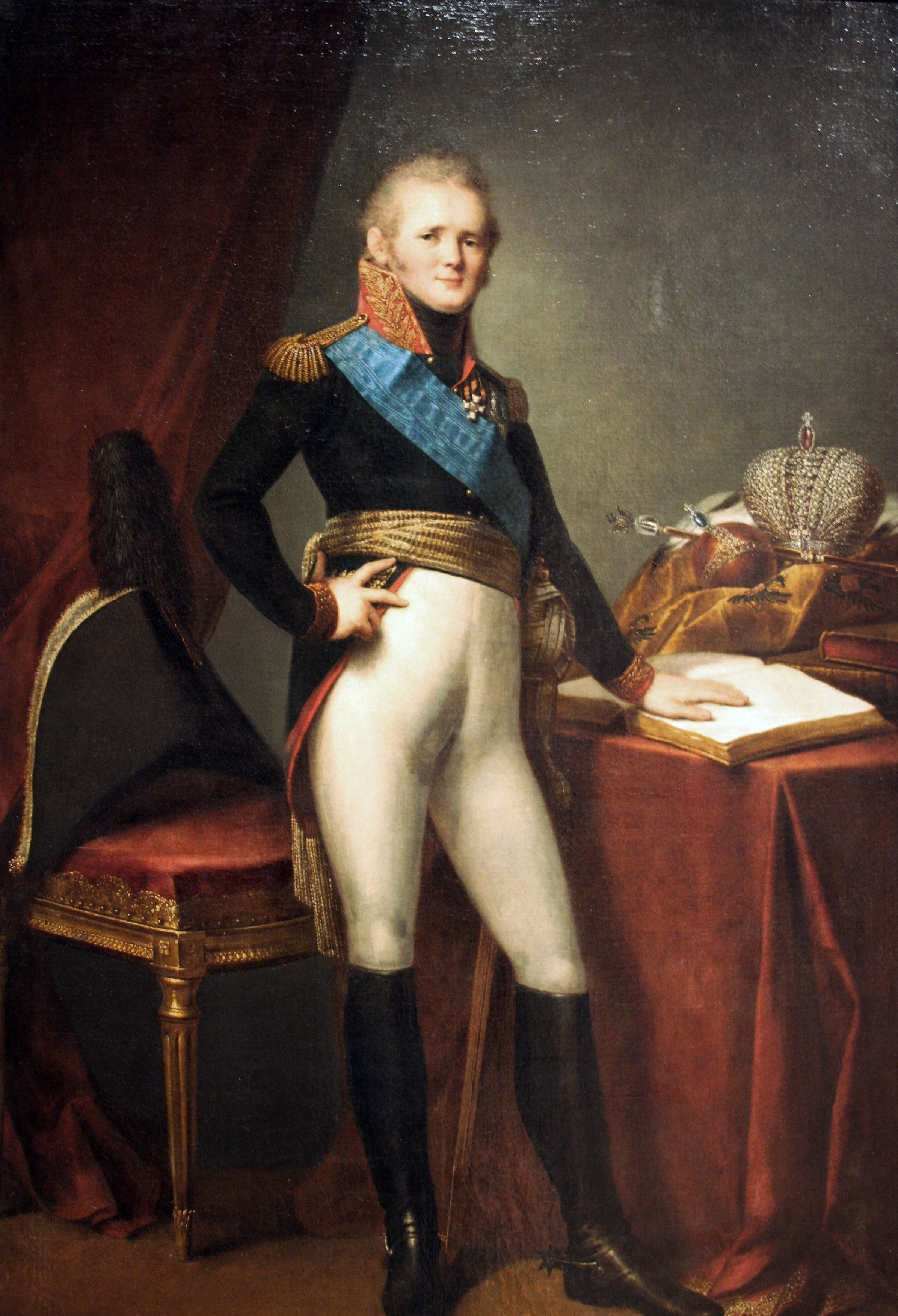 Тверь, Тверская областная картинная галерея